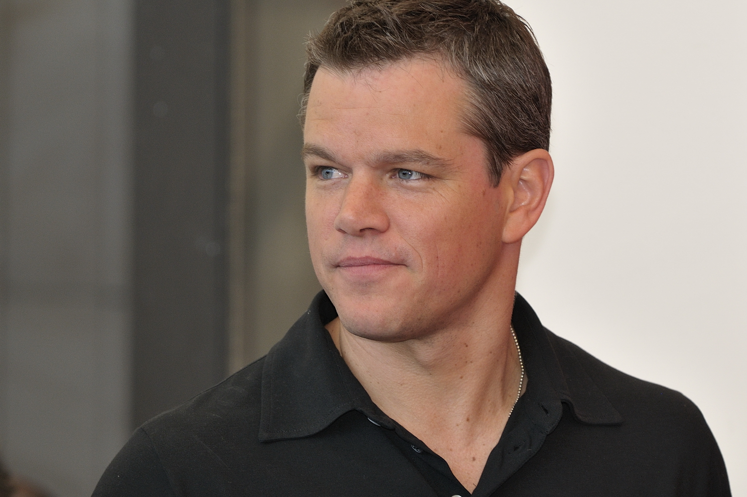 66ème Festival du Cinéma de Venise (Mostra), 6ème jour (07/09/2009) Photocall avec Matt Damon et Steven Soderbergh pour le film : The Informant